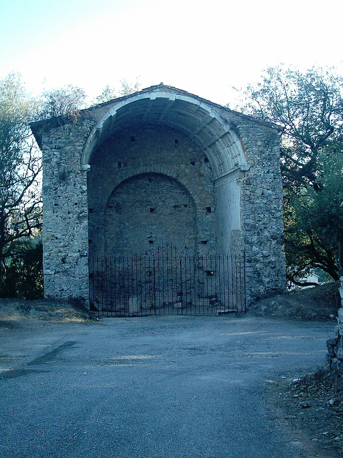 Castelo de Pombal - Capela Românica de São Miguel